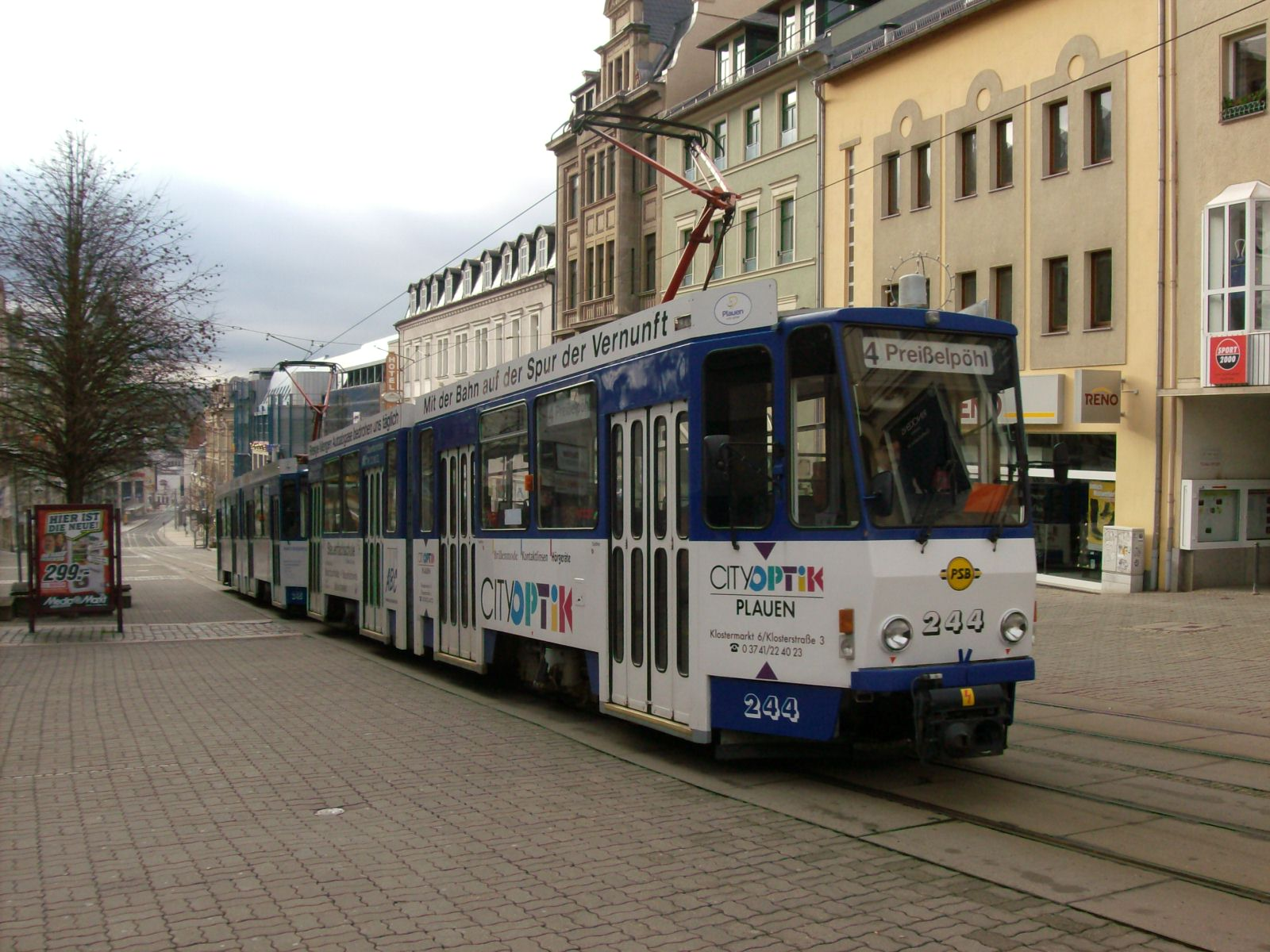 Am Totensonntag befährt die Doppeltraktion aus den Triebwagen 244 und 245 die Bahnhofstraße.